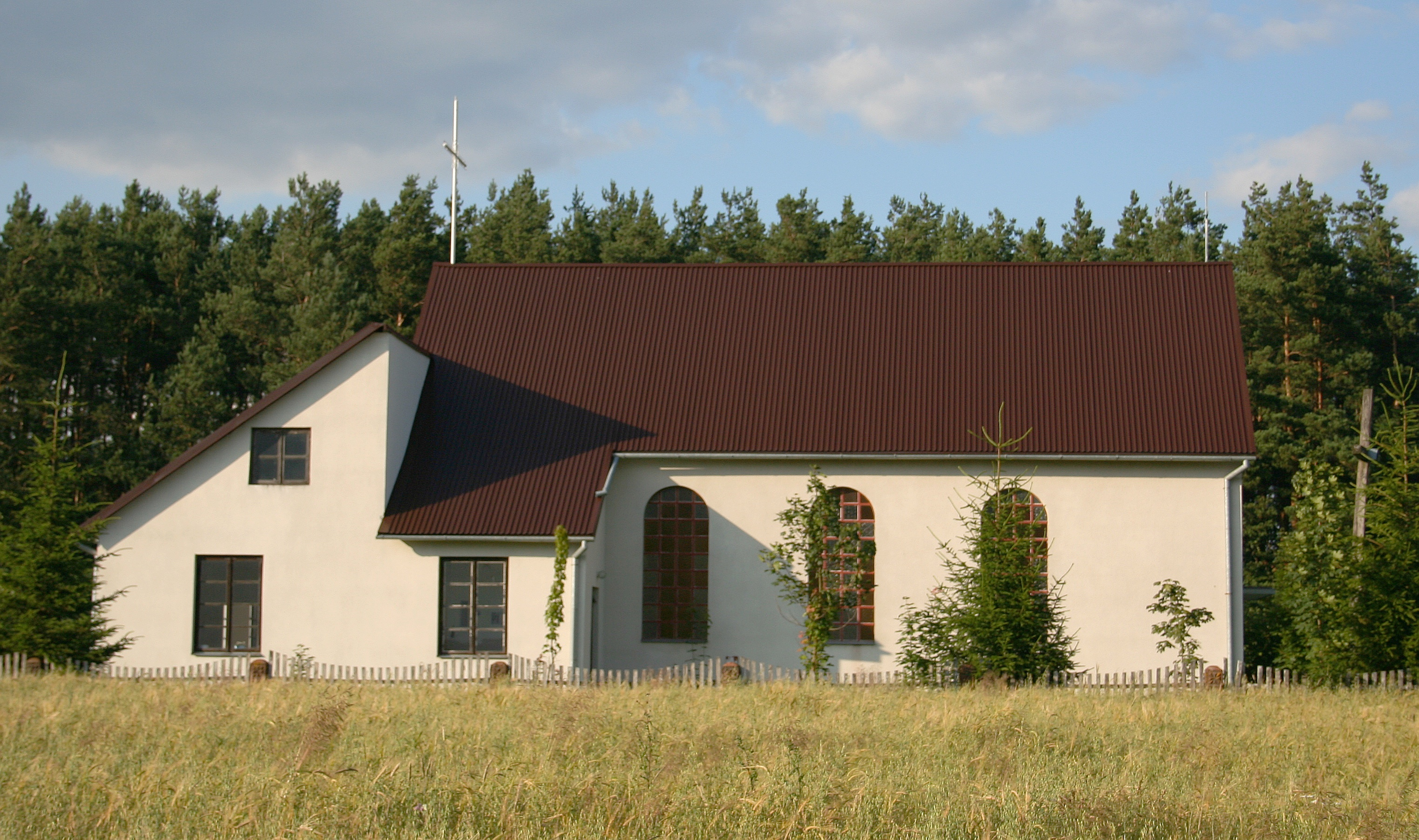 Kaplica w Wałkach, gmina Milejczyce, woj. podlaskie